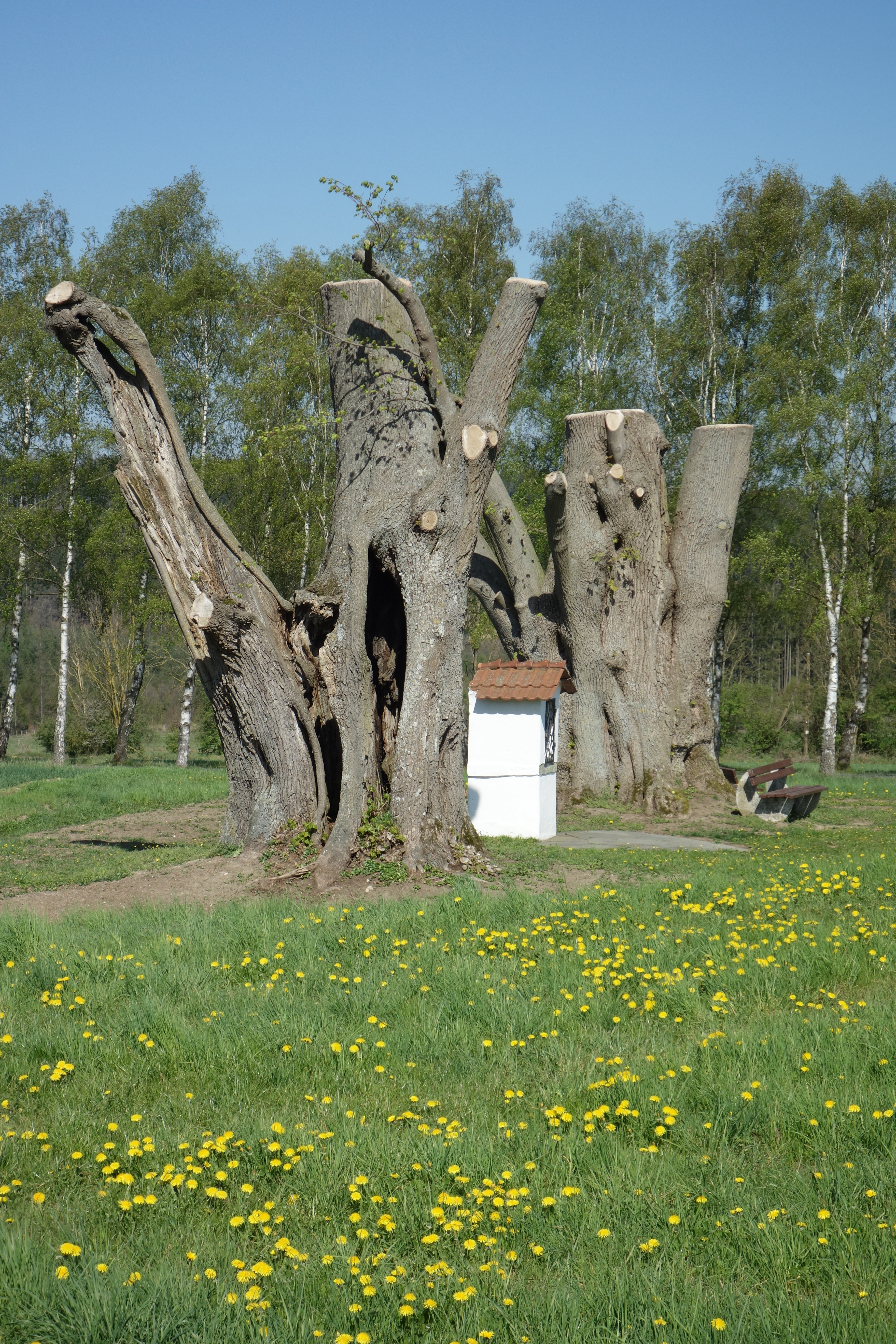 Naturdenkmal 2 Linden (Oberalme) nach Kappung 2018.